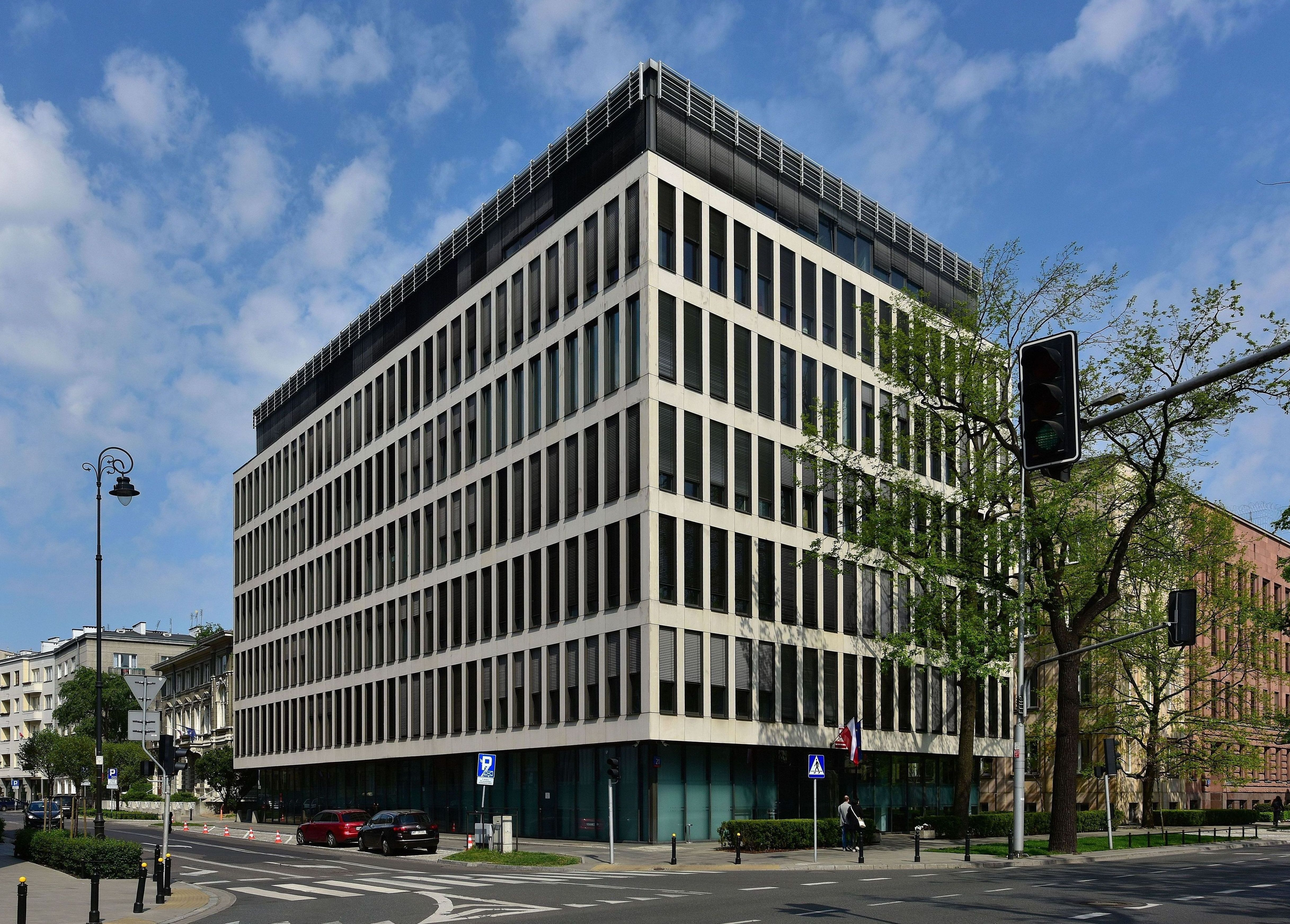 Biurowiec Articom Center przy al. J.Ch. Szucha 21 w Warszawie należący do Ministerstwa Spraw Zagranicznych Rzeczypospolitej Polskiej.